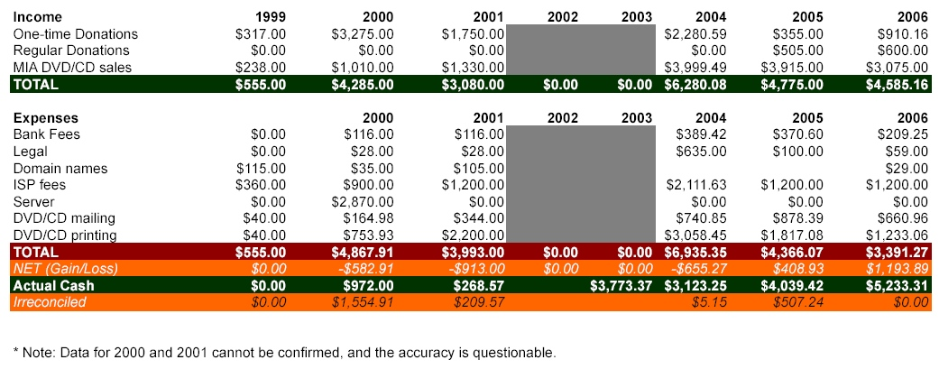 MIA Income & Expenses 1999-2006 Detail